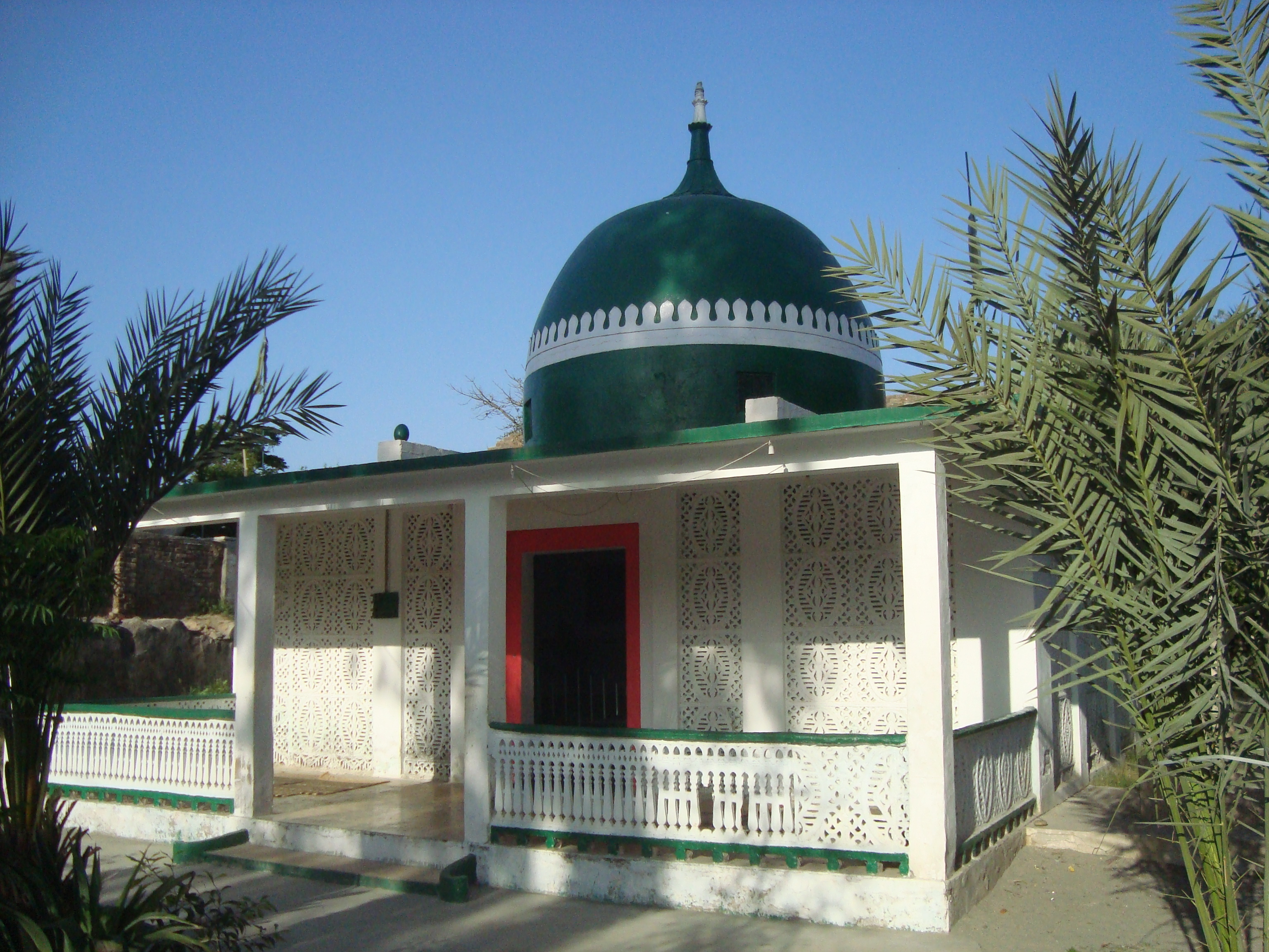 مزار شیخ اخوند ادین بابا سلجوقی اکوڑہ خٹک نوشہرہ میں دریائے لنڈا کے کنارے واقع ہے۔آپ کی اولاد زیارت کاکا صاحب میں قاضیان یا قاضی کے نام سے جانے جاتے ہین جو ایک علمی خاندان ہے